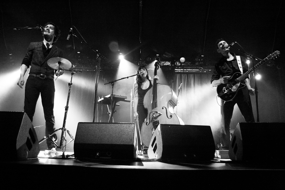 Las Ondas Marteles en concert au Cabaret Sauvage (Paris 19ème) le 6 septembre 2009.